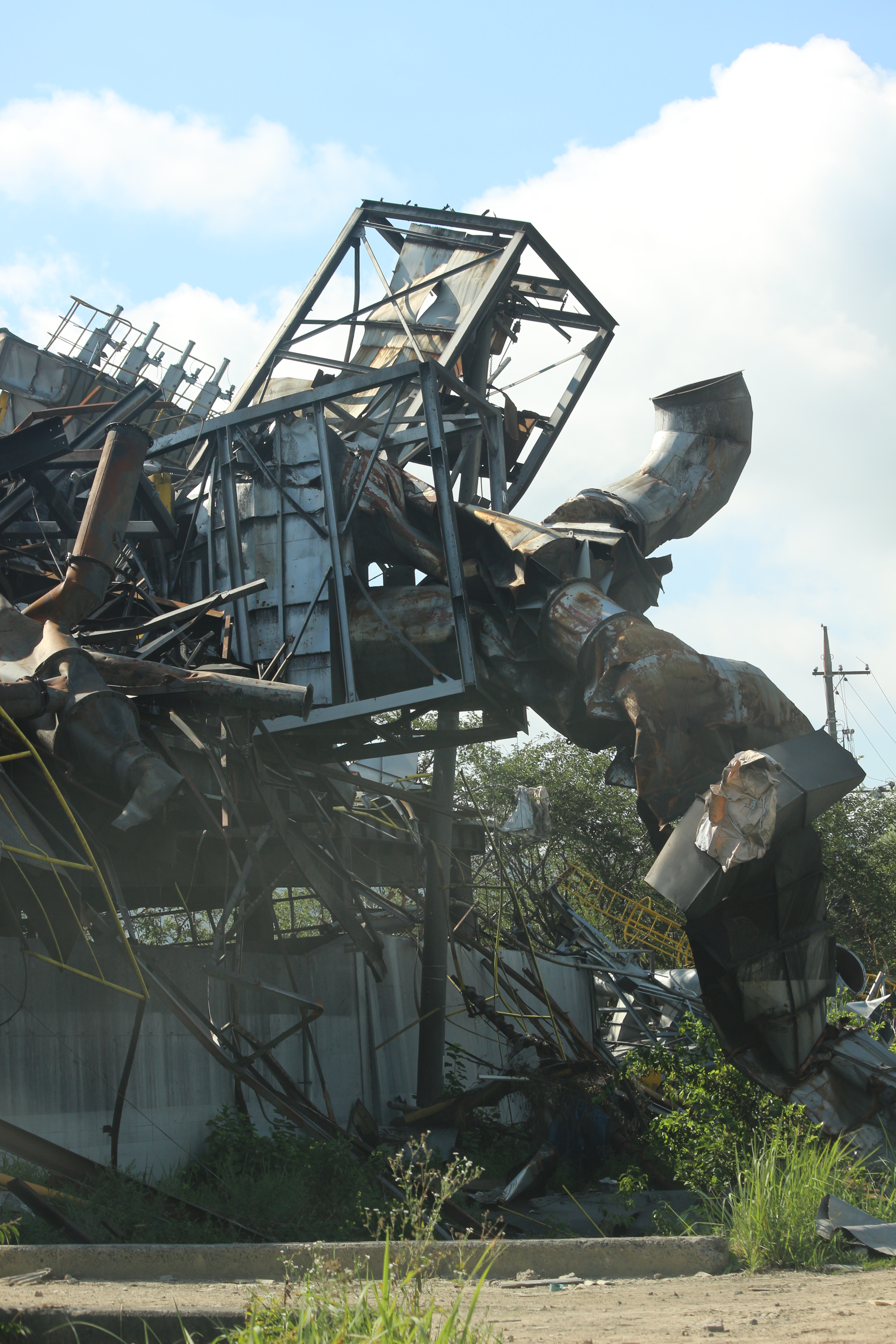 岡山県総社市下原で2018年7月に起きた朝日アルミ産業の爆発事故。爆発した溶解炉。